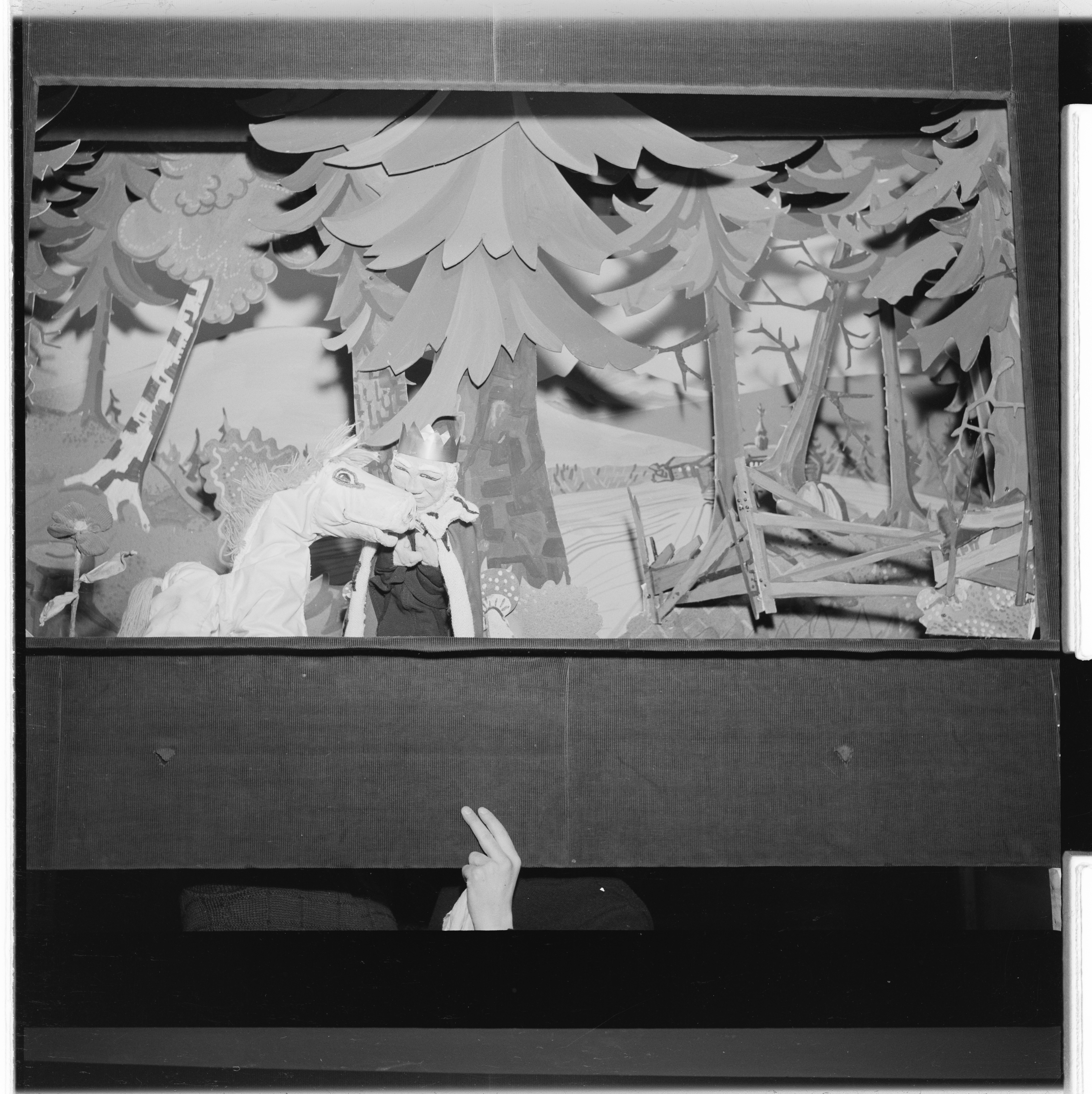 Bildet er hentet fra Arkivverket. Dukketeater "Gjete kongens harer". NÅ nr.3, 1953. Arkivinstitusjon : Riksarkivet Arkivnavn : Billedbladet NÅ Sted : Norge, Ukjent, Ukjent, Ukjent Emneord: Dukketeater, Dukker, Teater Avbildet